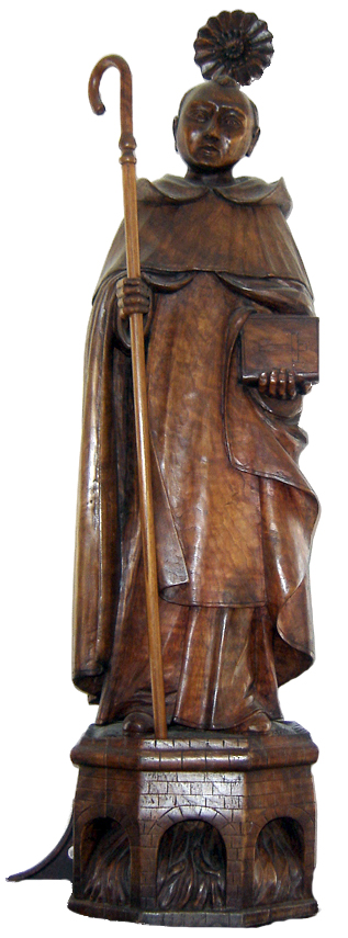 Figura de São Gonçalo, presente na Capela do Hospital de São Gonçalo, em Amarante, Portugal.